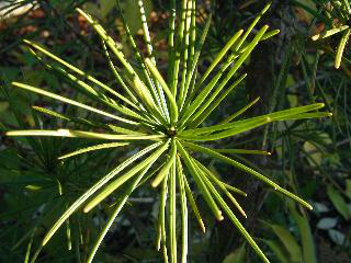 Sciadopitys verticillata